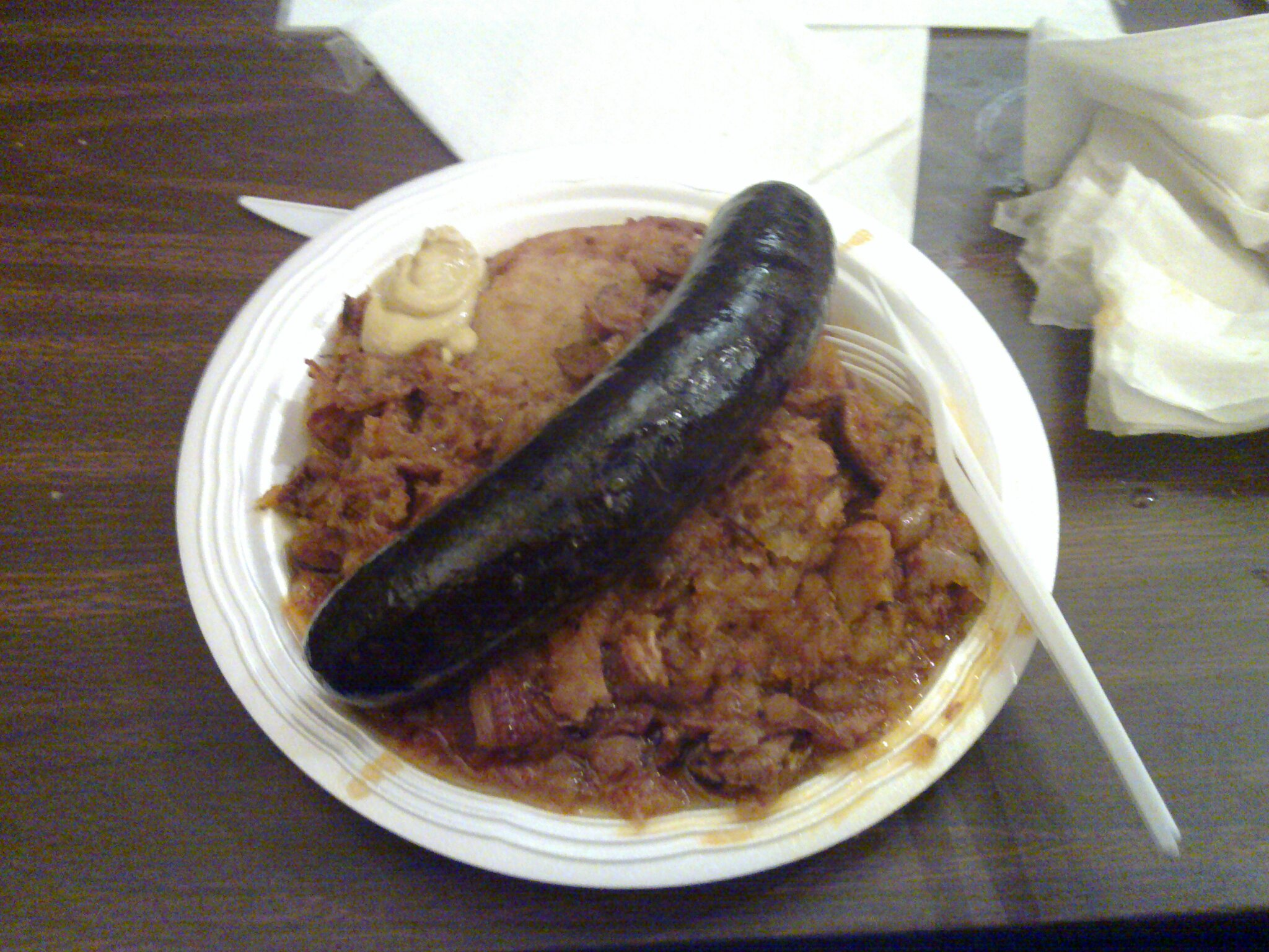 Boudin noir à l'oignon ou boudin de Paris et pommes de terre sautées accompagnant du bigos, ragoût de choux polonais